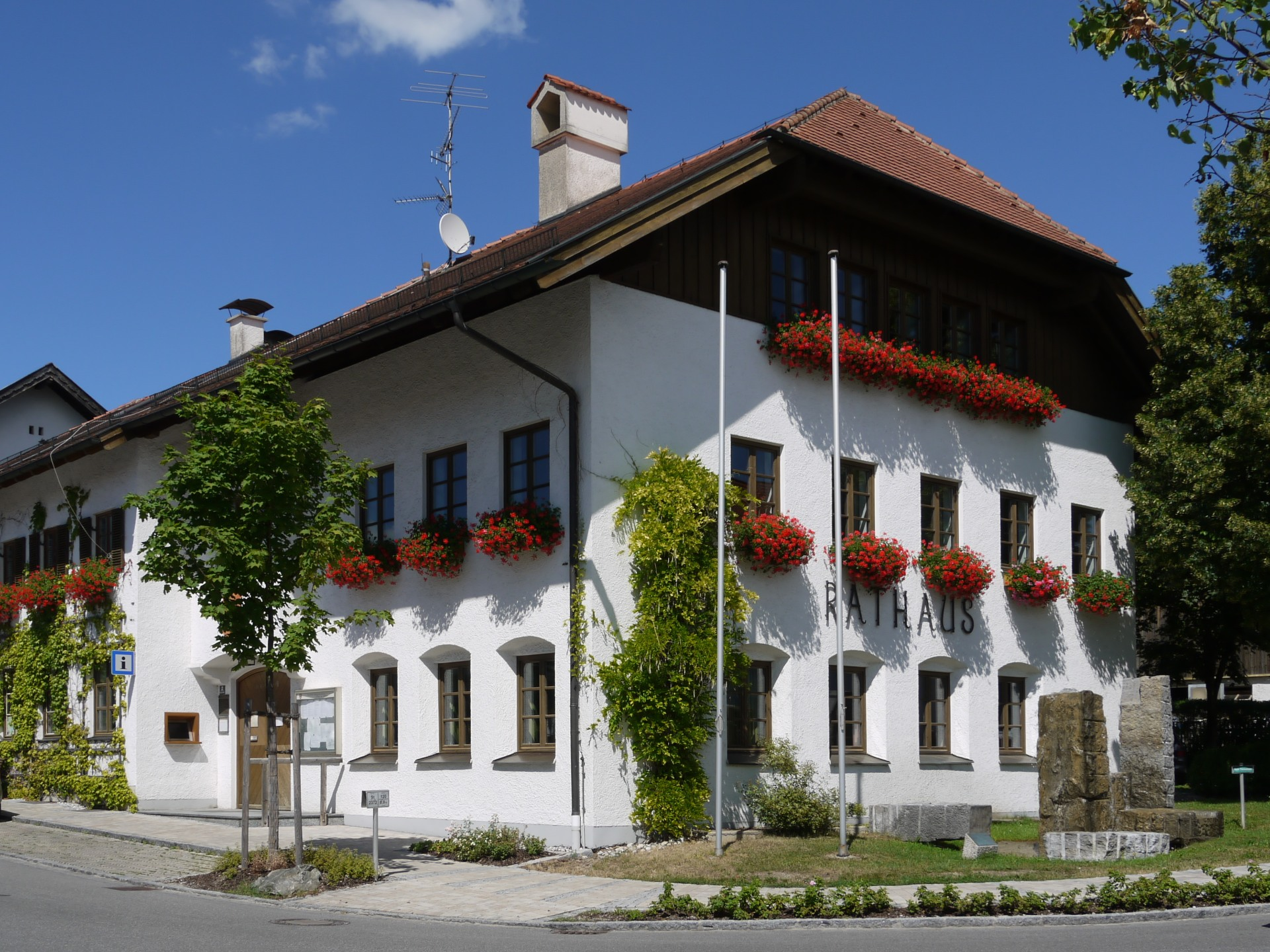 Rathaus der Stadt Uffing am Staffelsee